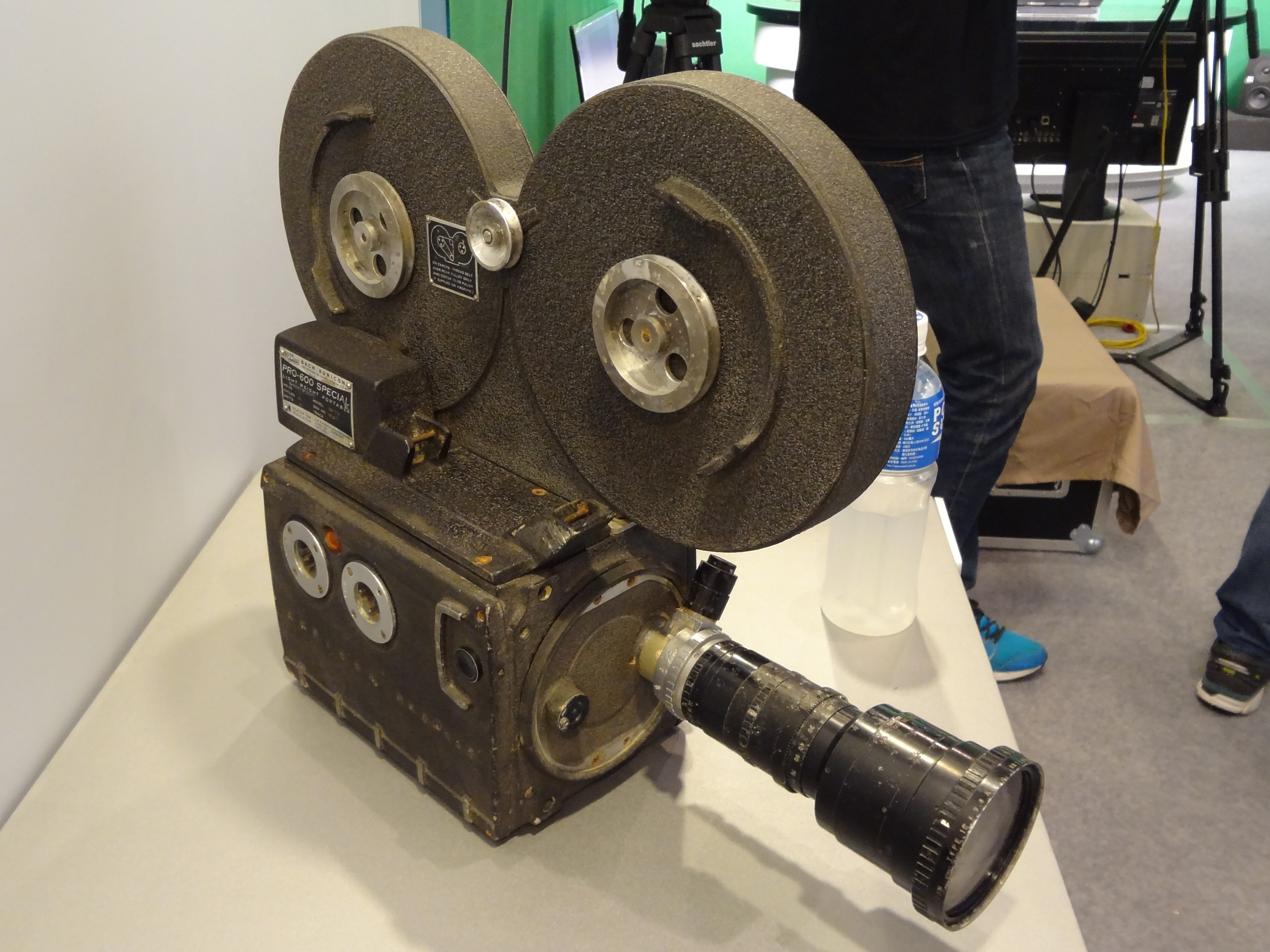 松山文化創意園區「金鐘五十．響」特別展展示品：1971年至1981年中國電視公司外景用Bach Auricon電影攝影機PRO-600。